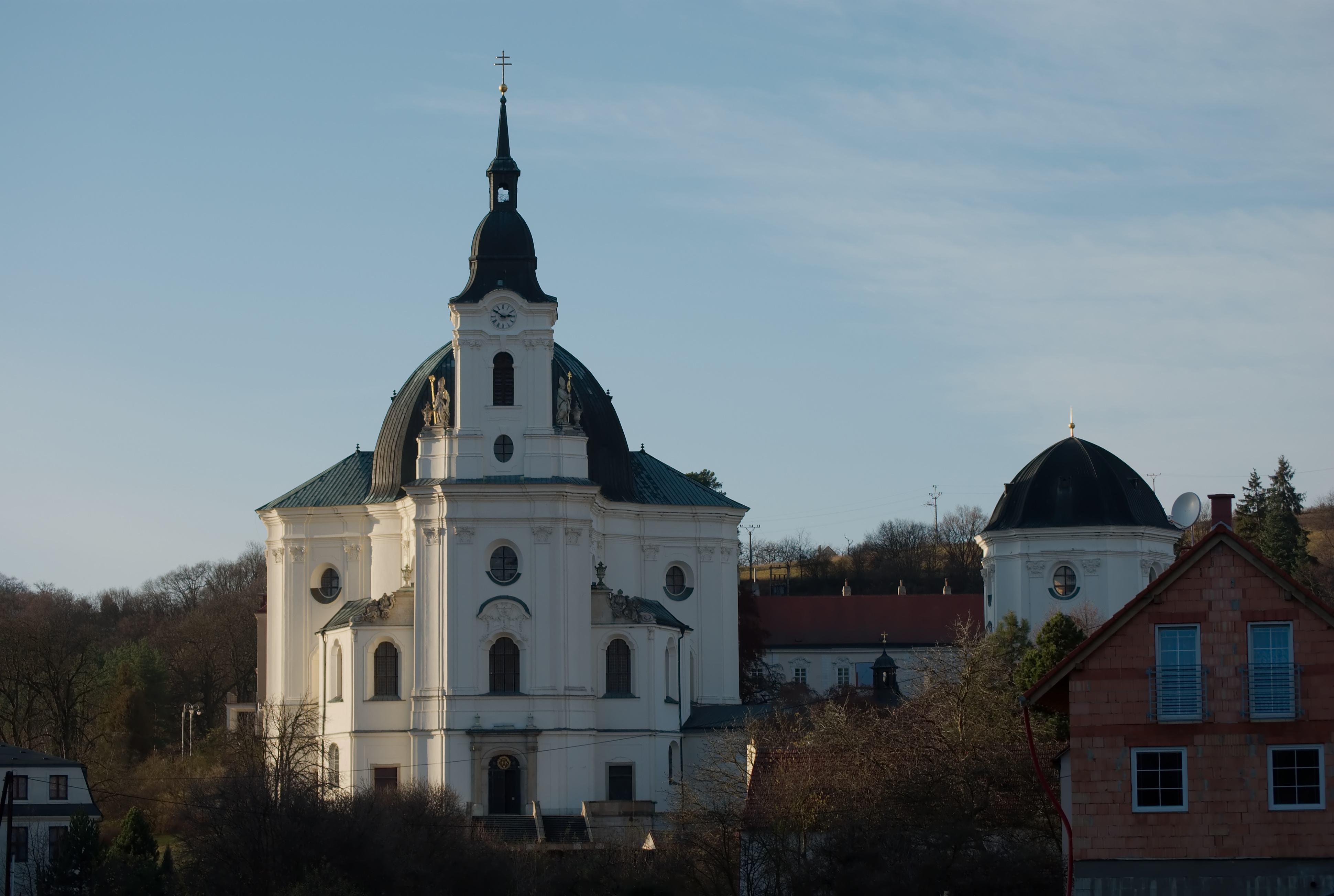 Chrám Jména Panny Marie ve Křtinách vyfotografovaný od jihovýchodu